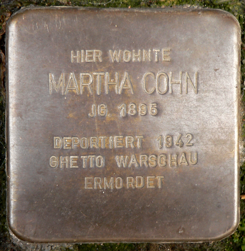 File:Stolperstein in Hameln für Martha Cohn